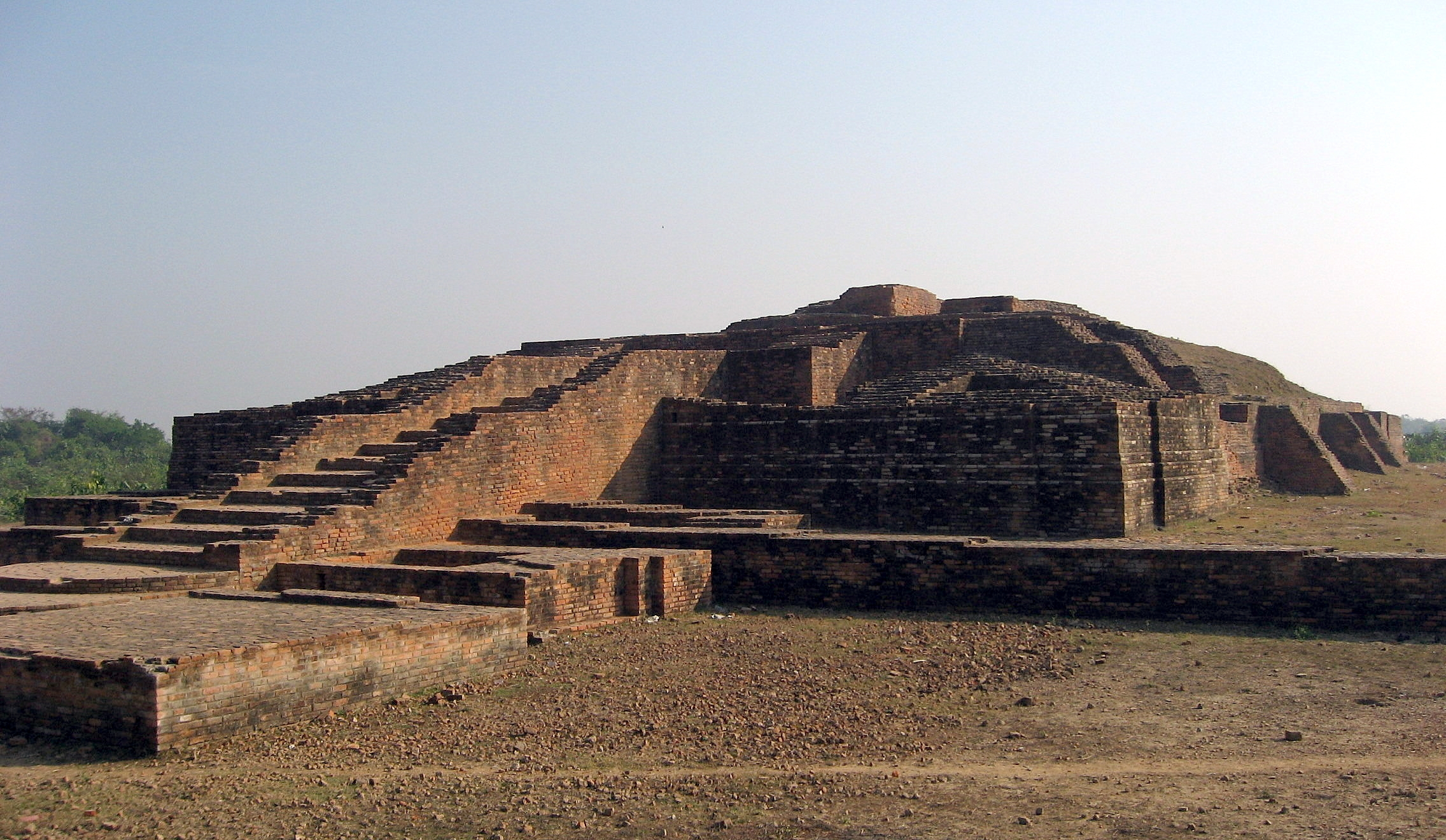 Anathapindika Stupa (or Sudatta Stupa), Sravasti, India.